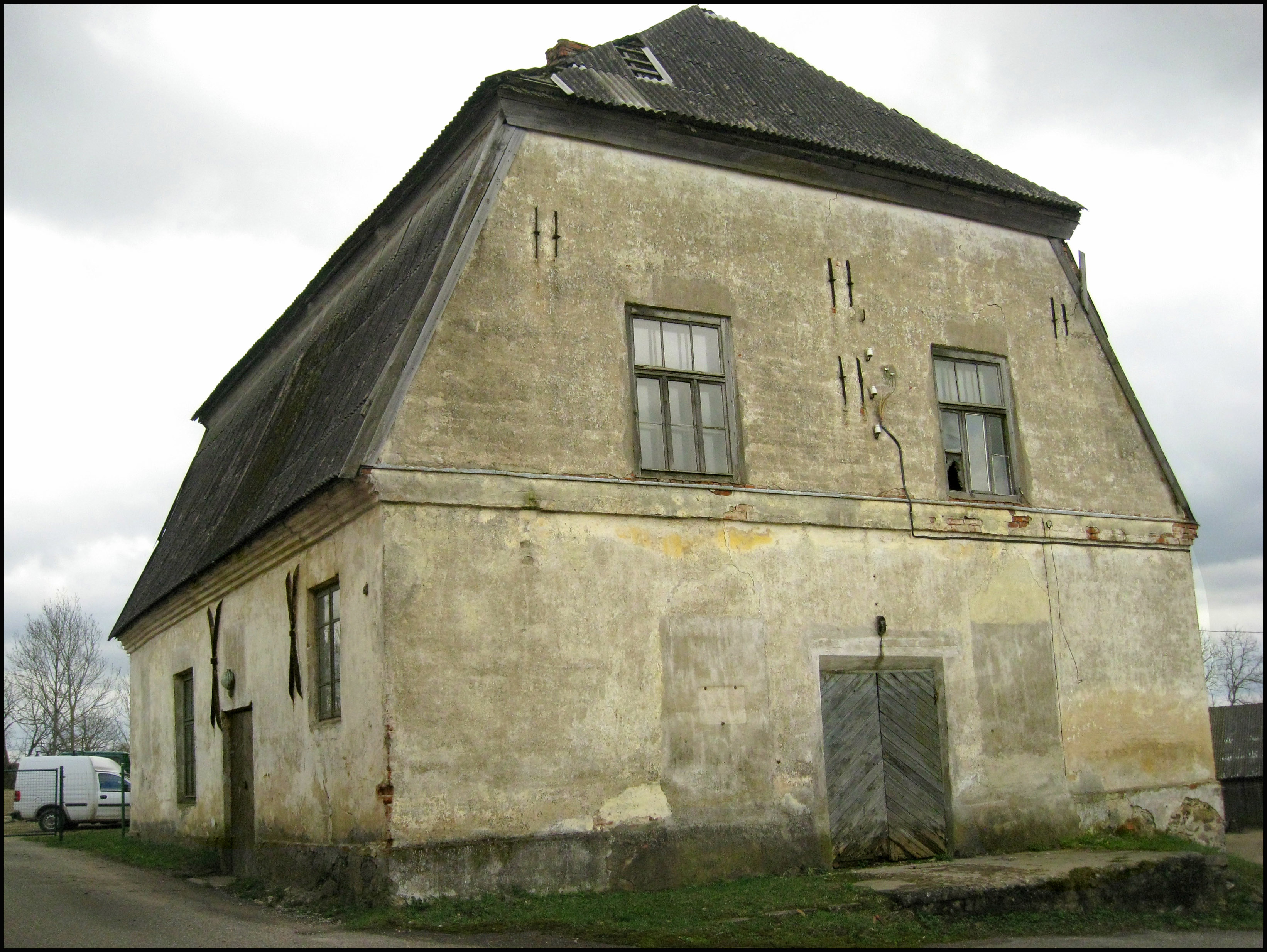 Valdemārpils former synagogue